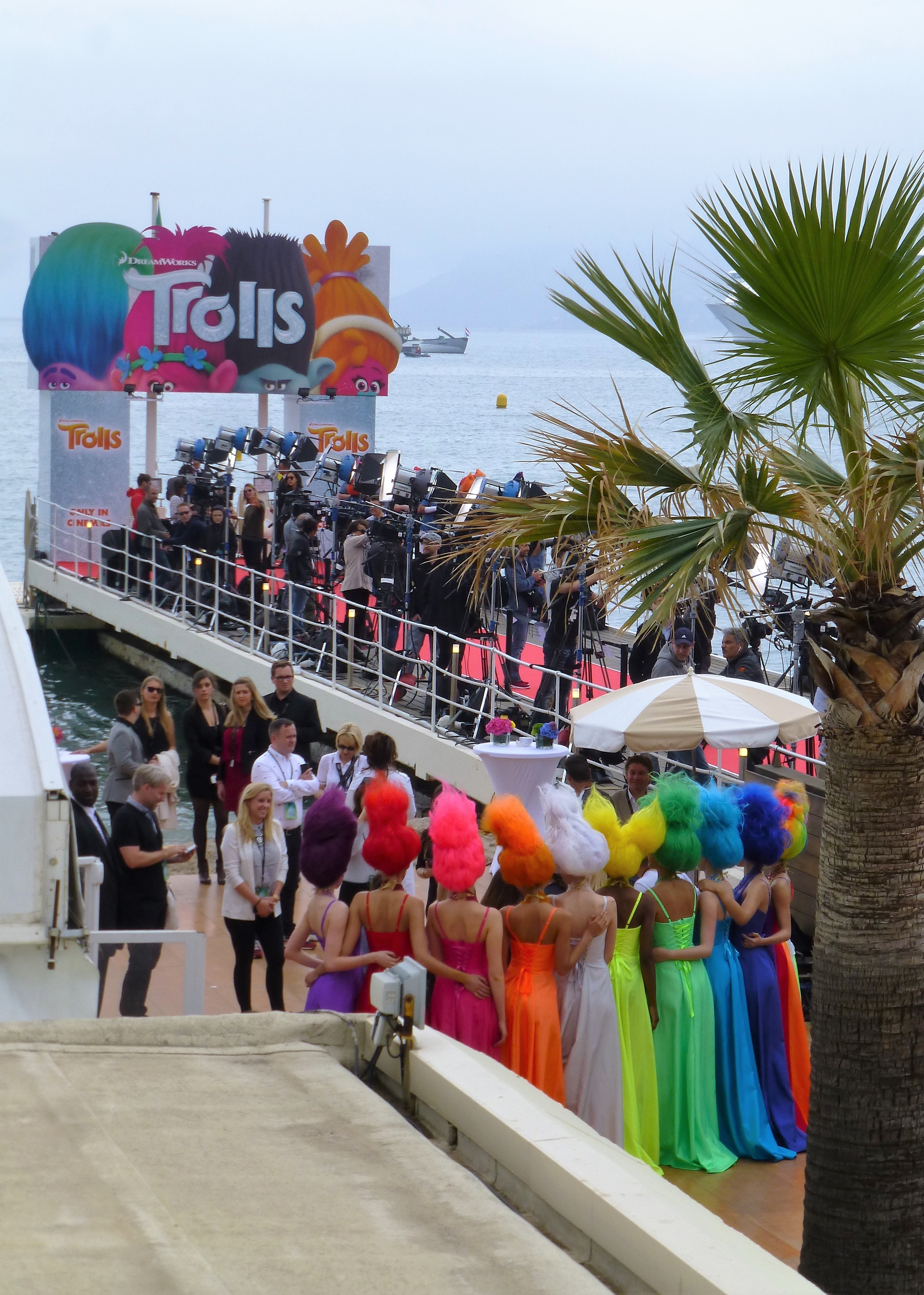 El punto de prensa (photocall) de la película animada Trolls durante el Festival de Cine de Cannes 2016.